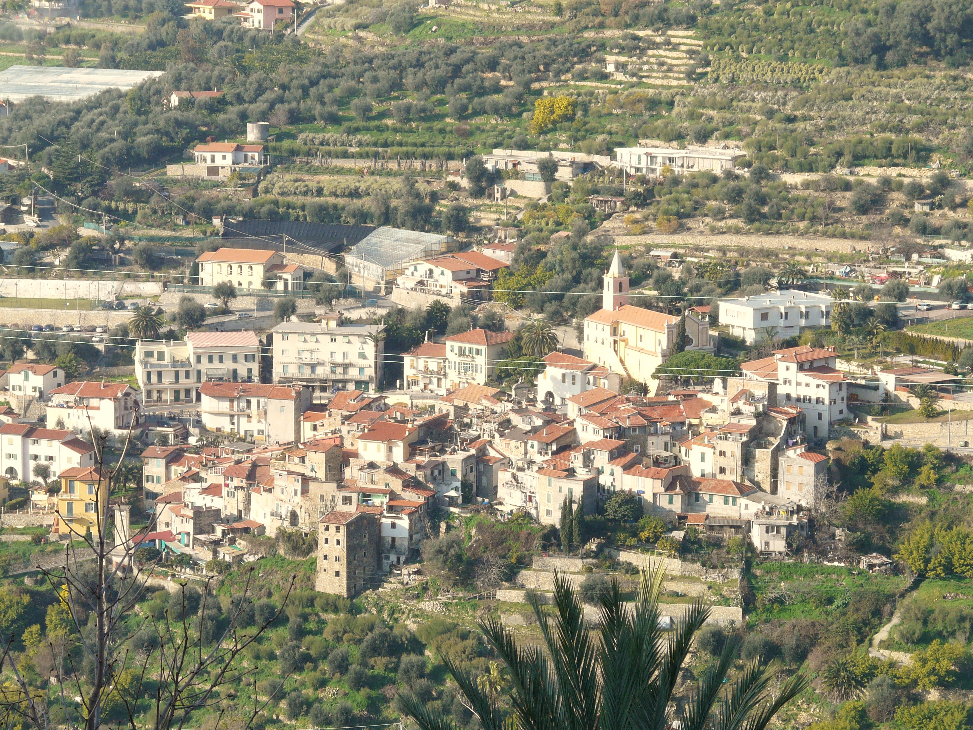 Borghetto San Nicolò, Bordighera, Liguria, Italia